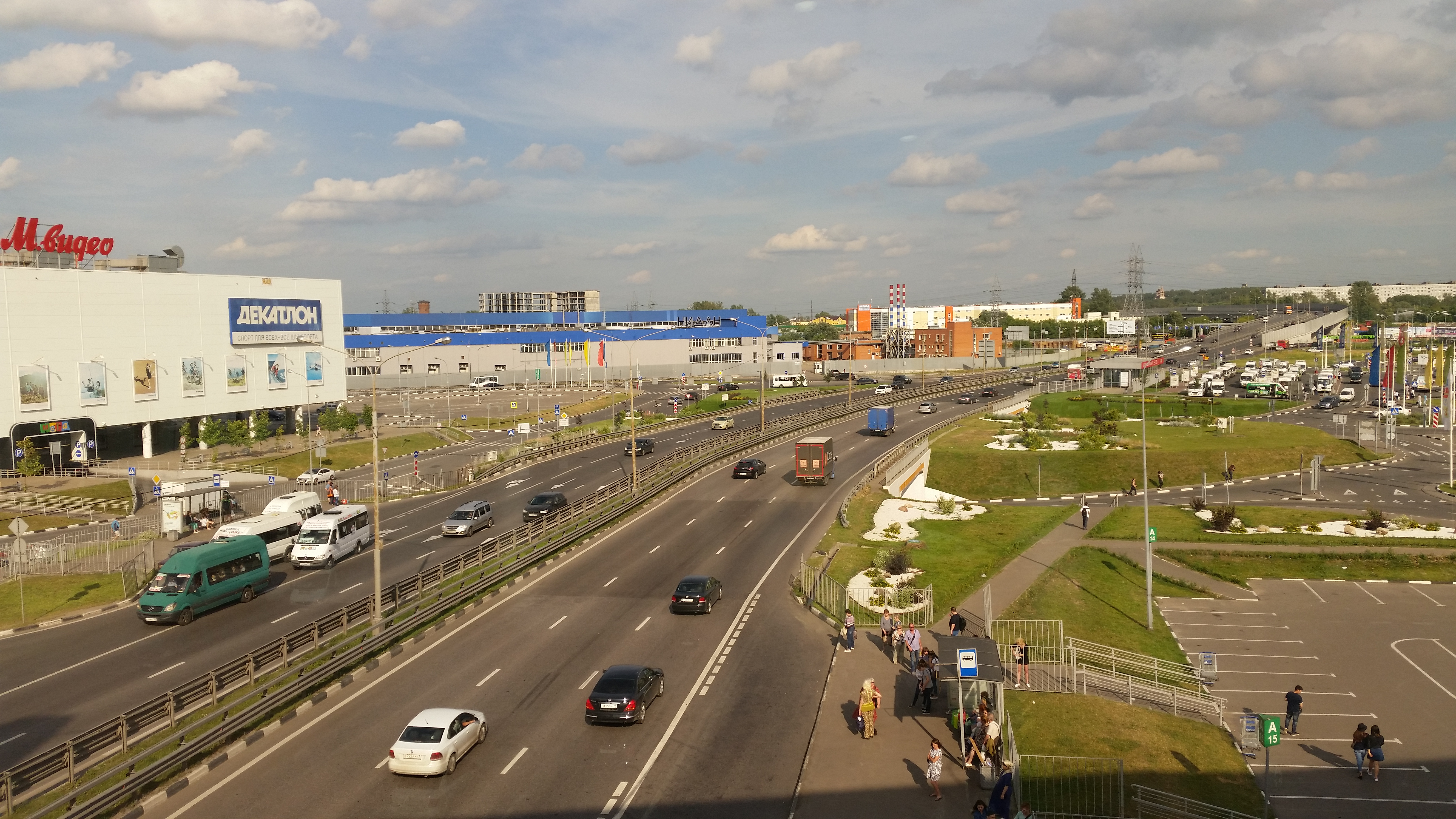 Новоегорьевское шоссе (Котельники, Московская область). Вид в сторону Новорязанского шоссе. Фотография сделана из перехода между корпусами торгового центра "Мега Белая дача".